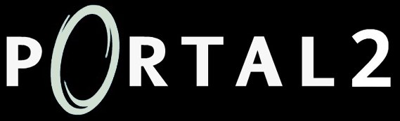 Portal 2's beta logo